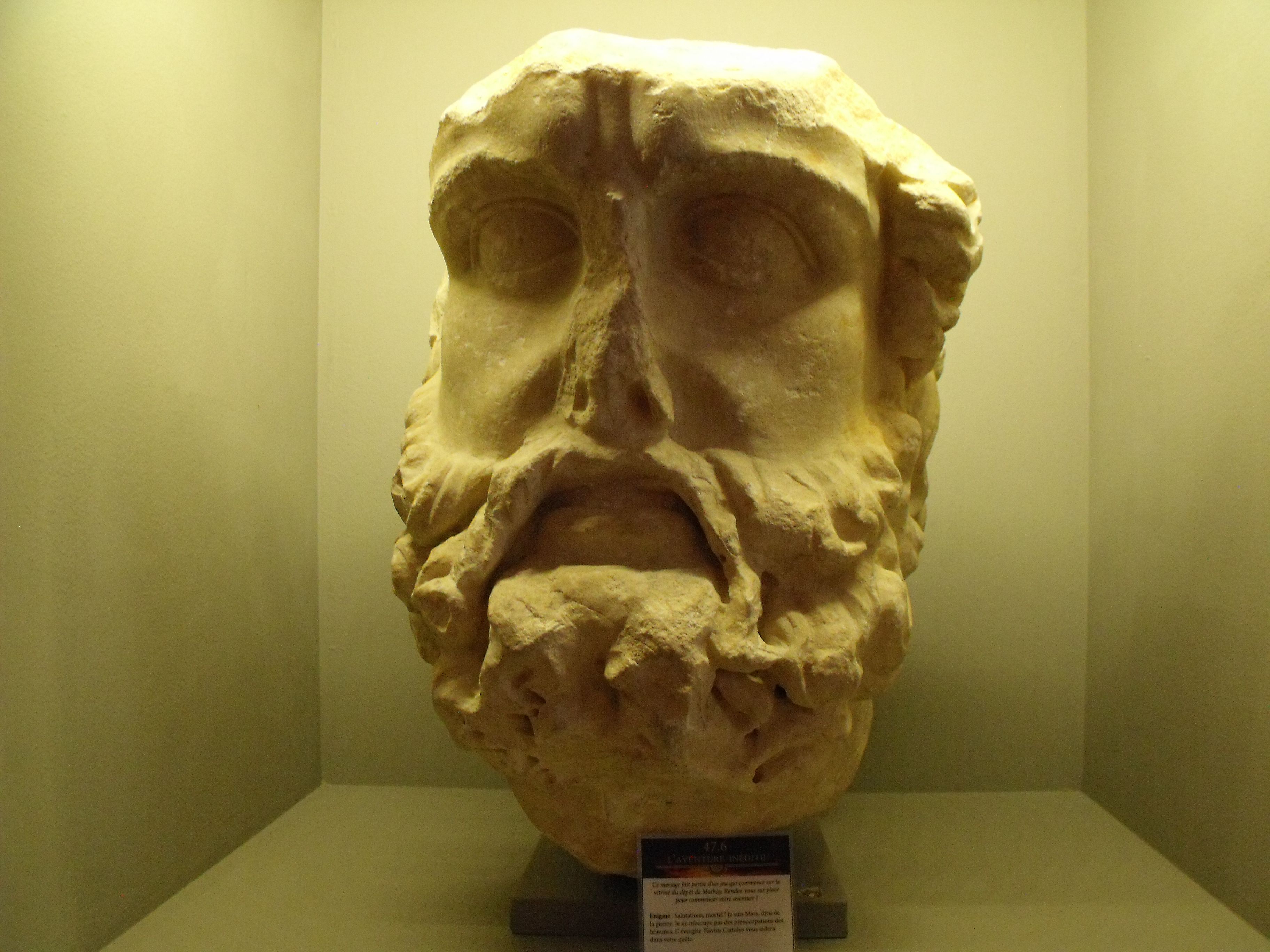 Fragment de statue du sanctuaire d'Epomanduodurum, issus des fouilles de Mandeure-Mathay, Musée de Montbéliard